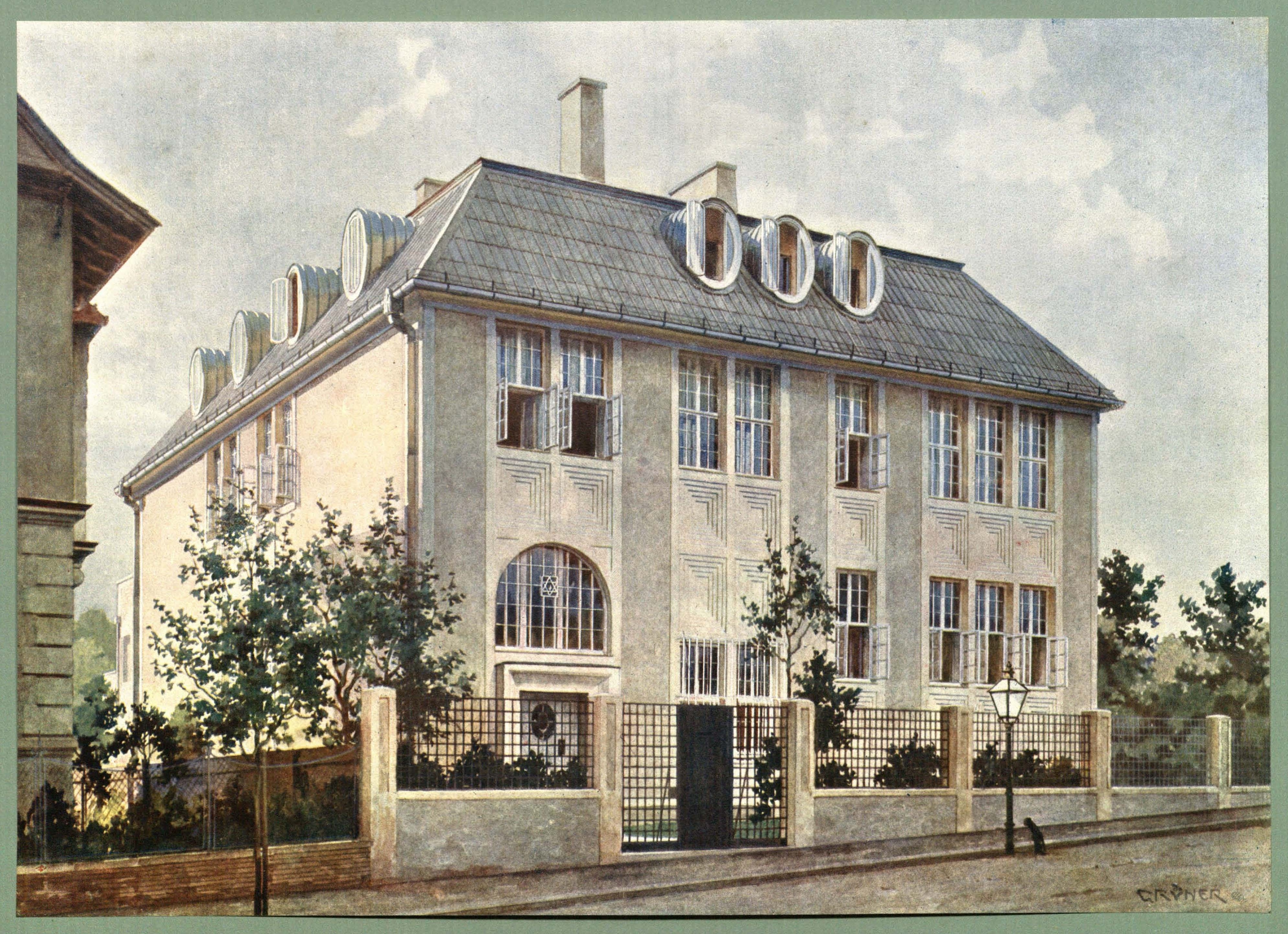 Villa Hasenauerstraße 59 (Haus Beer-Hofmann) in Wien-Währing, Architekt: Josef Hoffmann. Tafel 39 aus Oscar Grüner: Moderne Villen in Meisteraquarellen. Serie II. 64 Tafeln. Verlag Friedrich Wolfrum & Co. Wien und Leipzig ca. 1905.